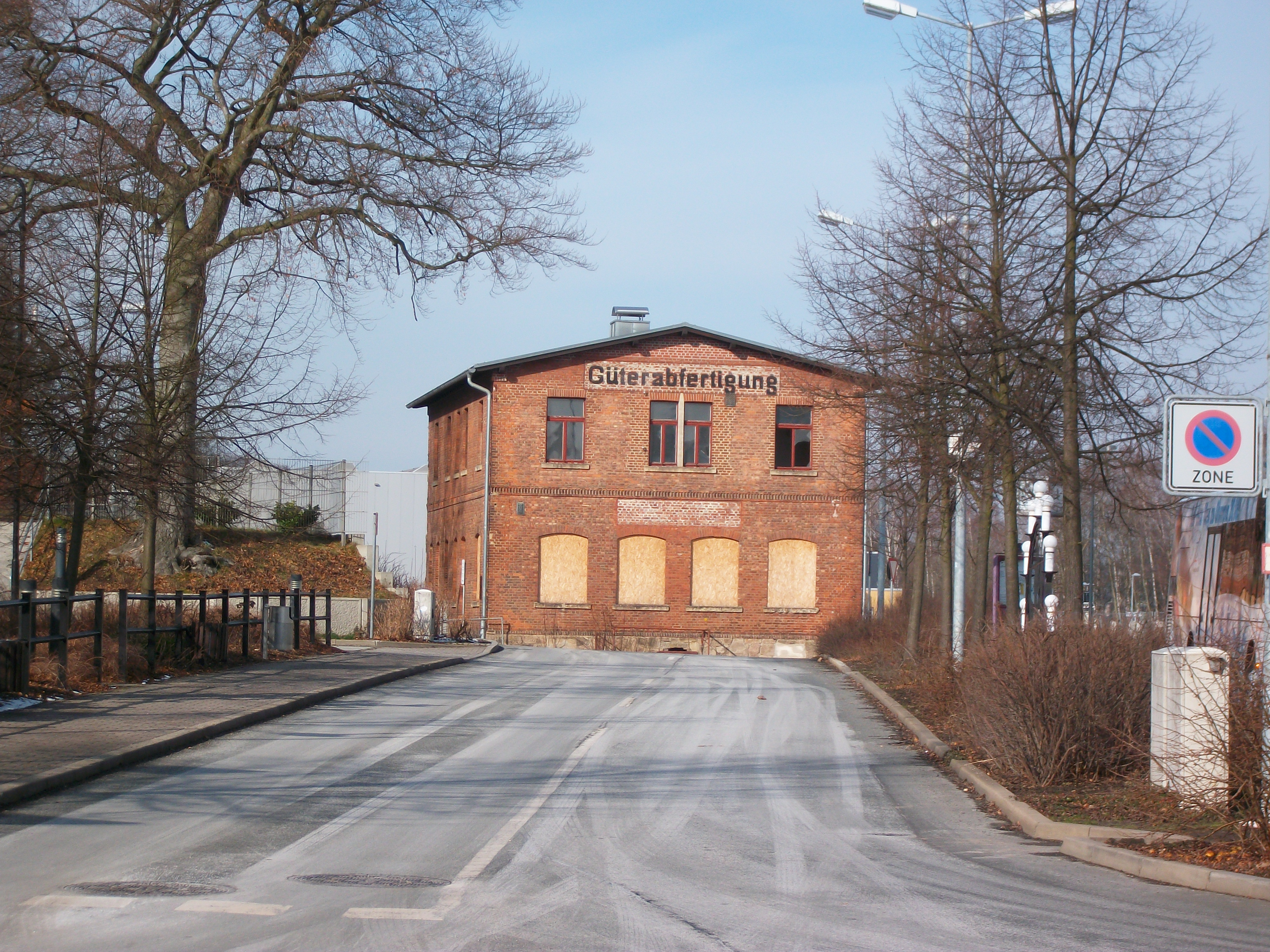 Güterabfertigung Bahnhof Schwarzenberg/Erzgebirge